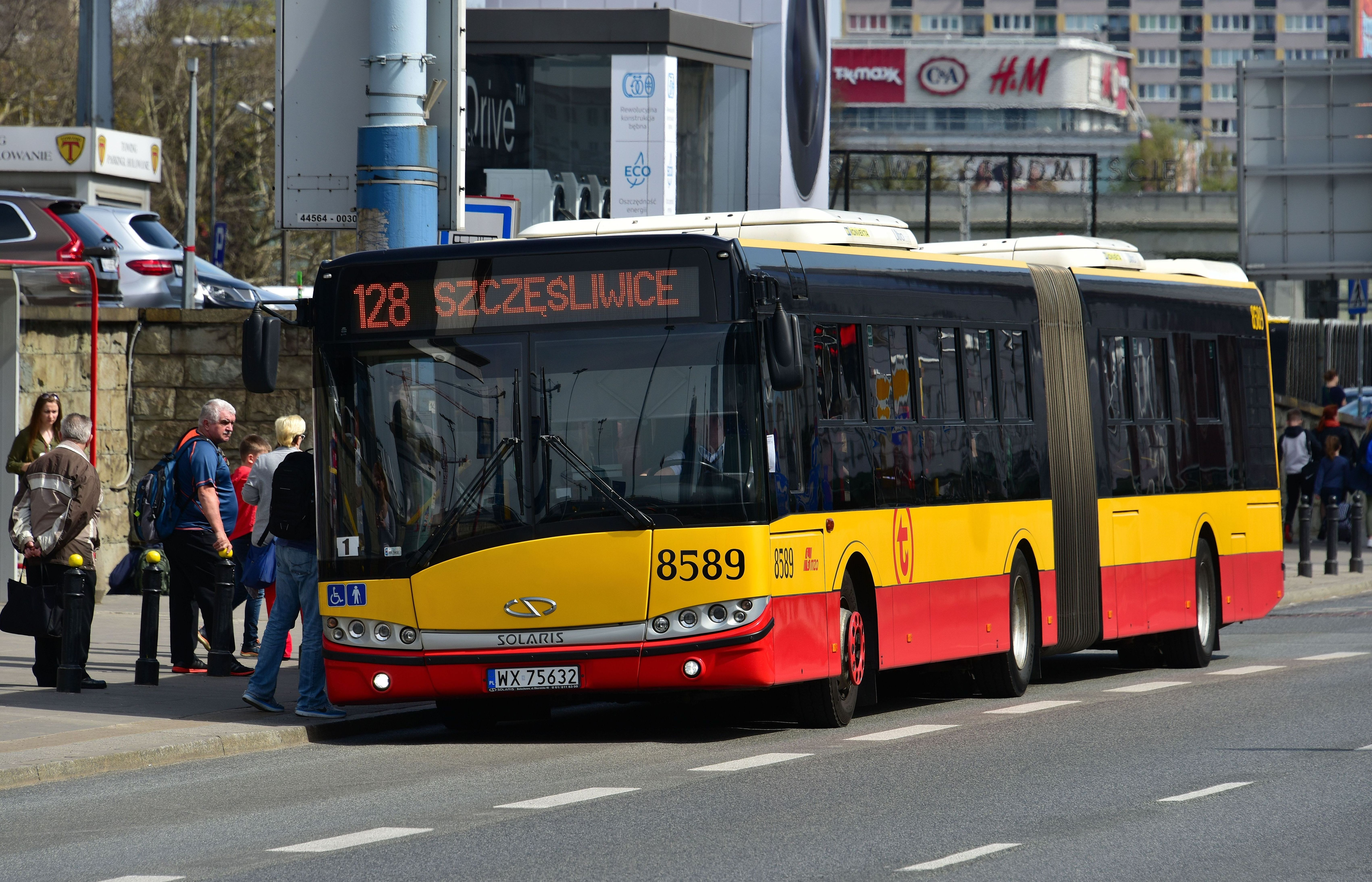 Solaris Urbino 18 na przystanku Dworzec Centralny w Warszawie